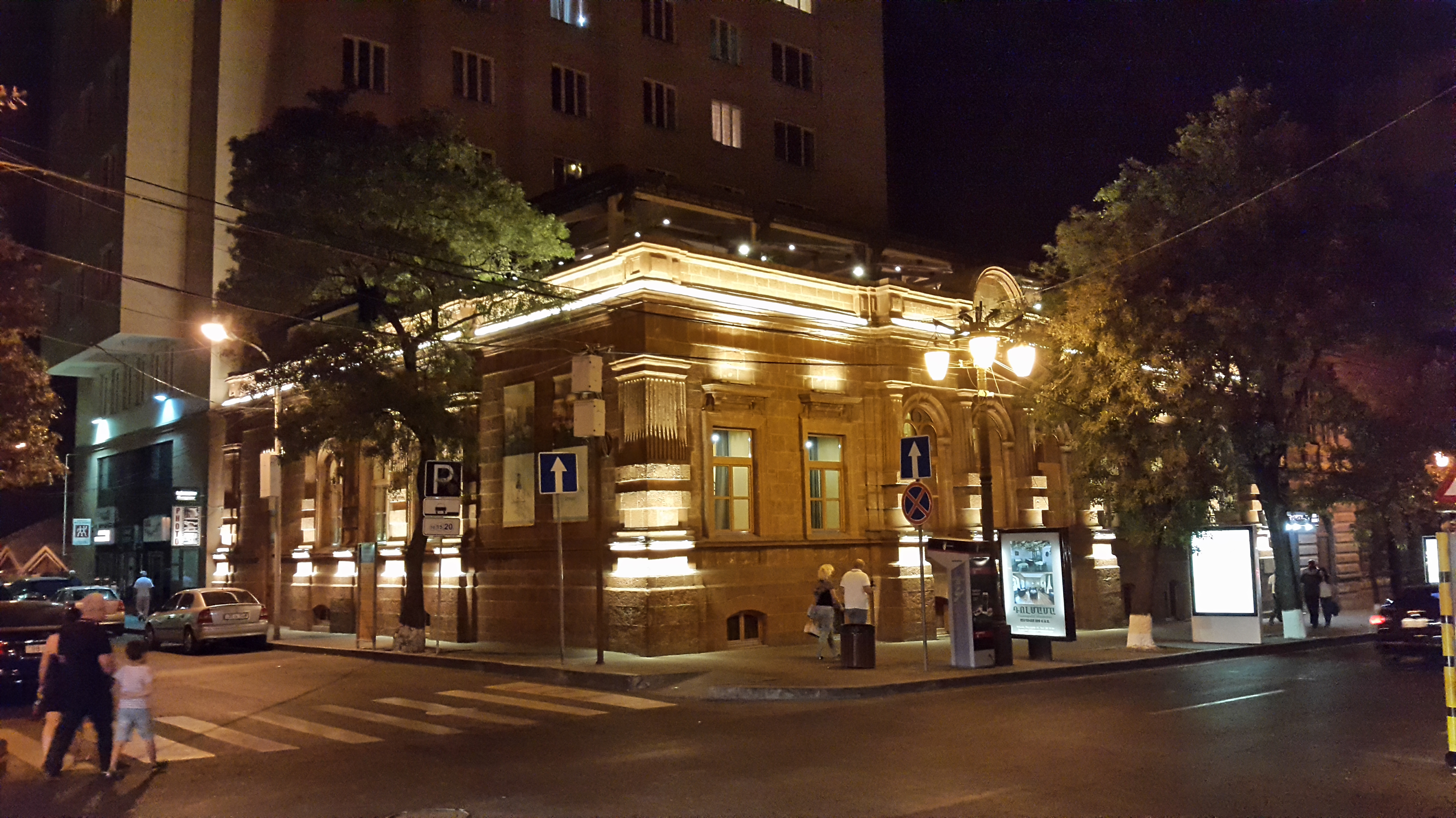 Բնակելի տուն Բարսեղ Եղիազարյանի 6/178.4.8